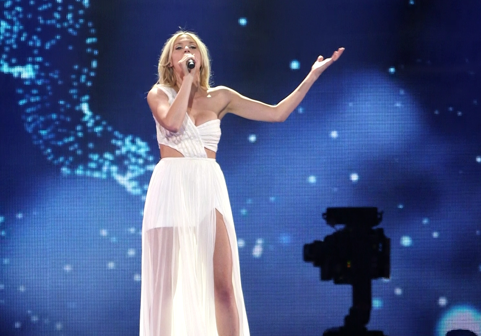 Polska piosenkarka Kasia Moś podczas prób do występu w Konkursie Piosenki Eurowizji 2017.